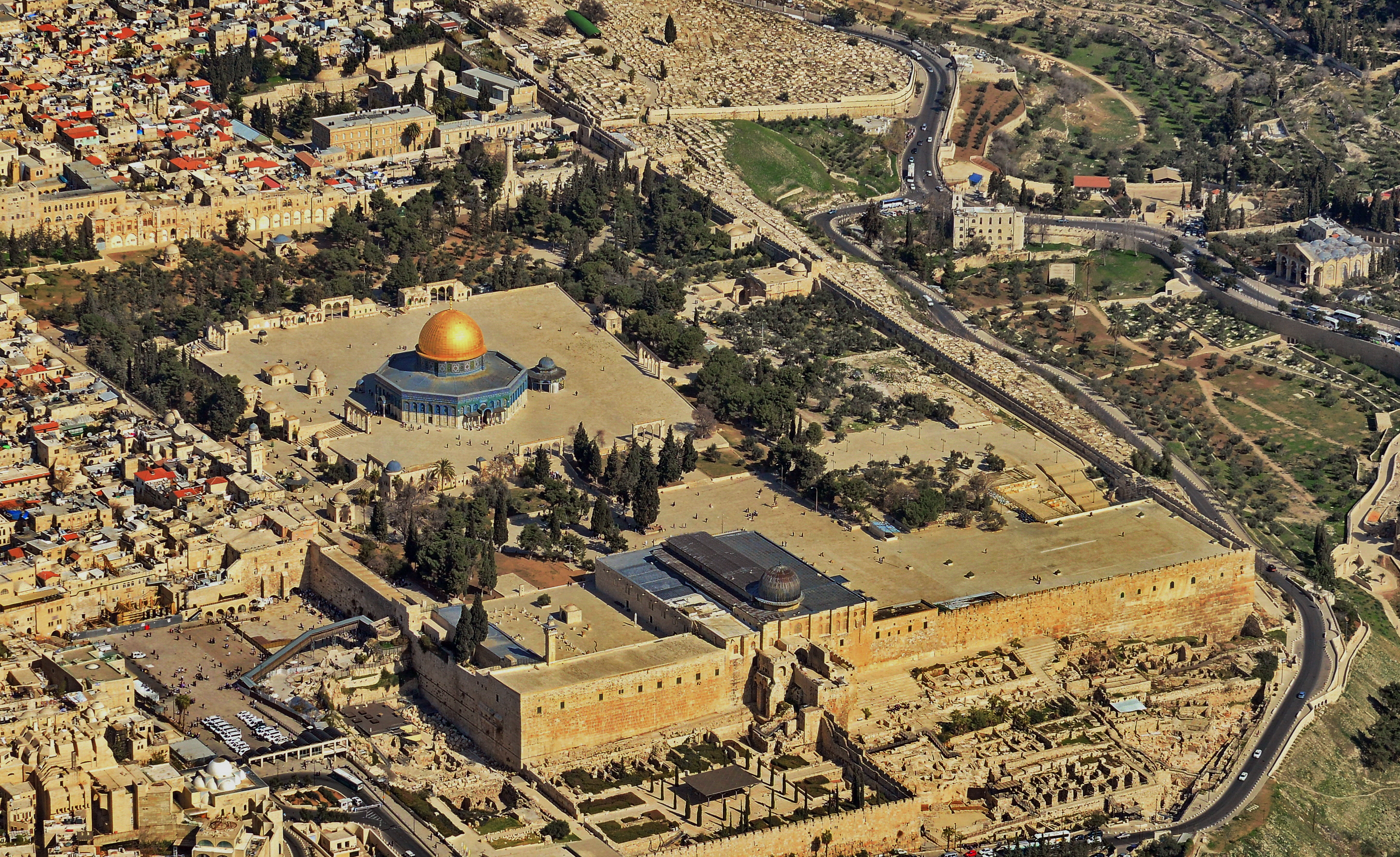 הר הבית הוא מתחם מוגבה ושטוח בן כ־140 דונם במזרח העיר העתיקה בירושלים, שהינו הרחבה מלאכותית מתקופת הורדוס (בן המאה הראשונה לפני הספירה), של הר המוריה הקדום.